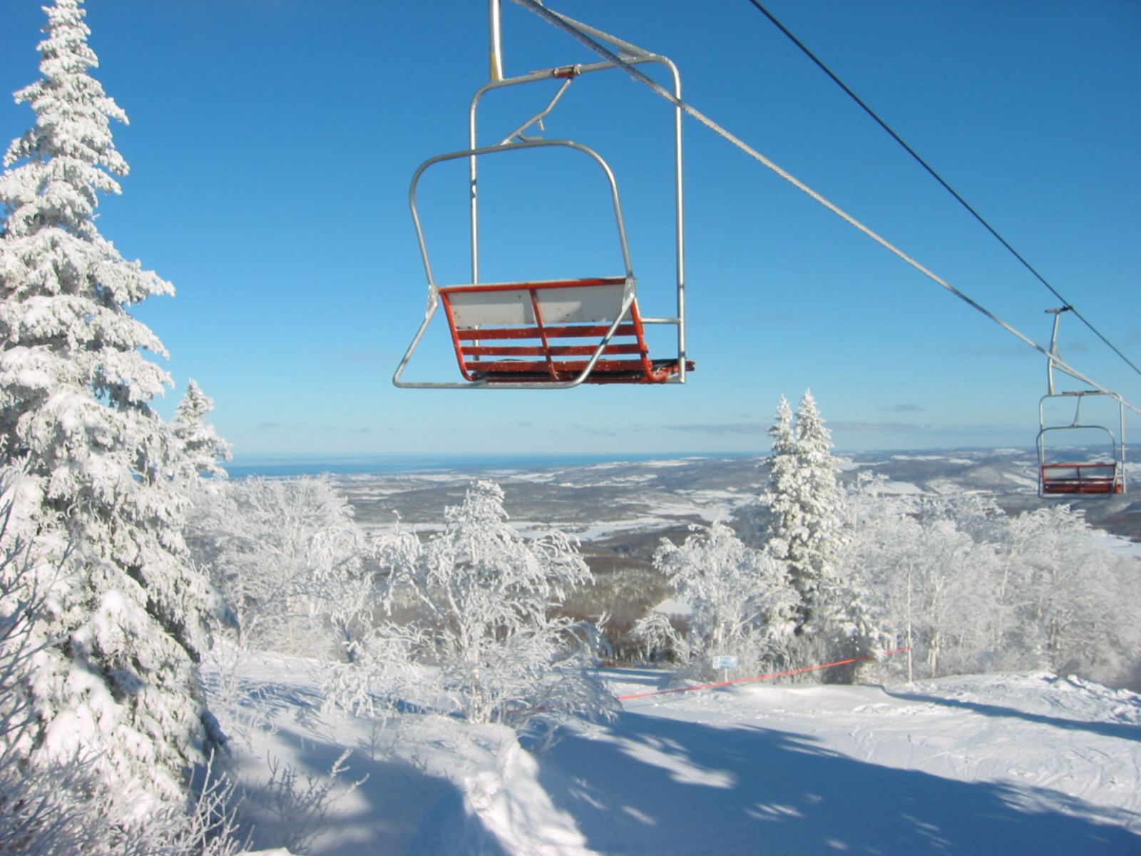 Fleuve Saint-Laurent vue de la station de ski du Parc du Mont-Comi, Bas-Saint-Laurent, Québec, Canada